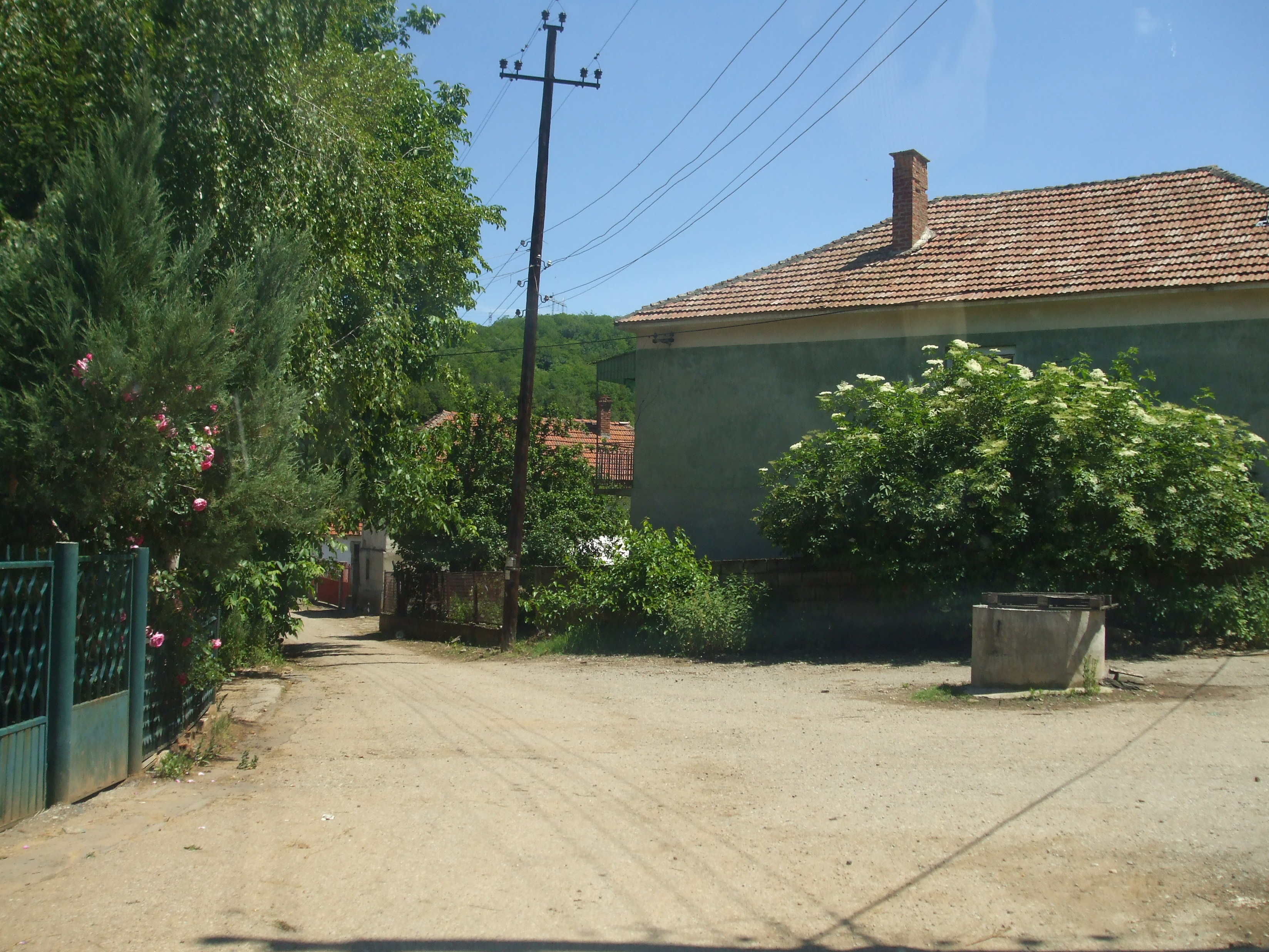 Donje Vlase